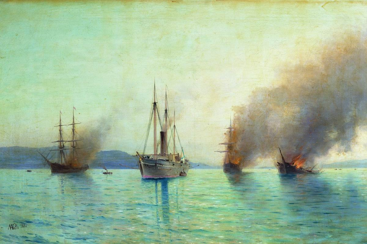 Картина Л.Ф.Лагорио "Уничтожение пароходом "Великий князь Константин" турецких судов у Босфора. 1877 год." 1880.